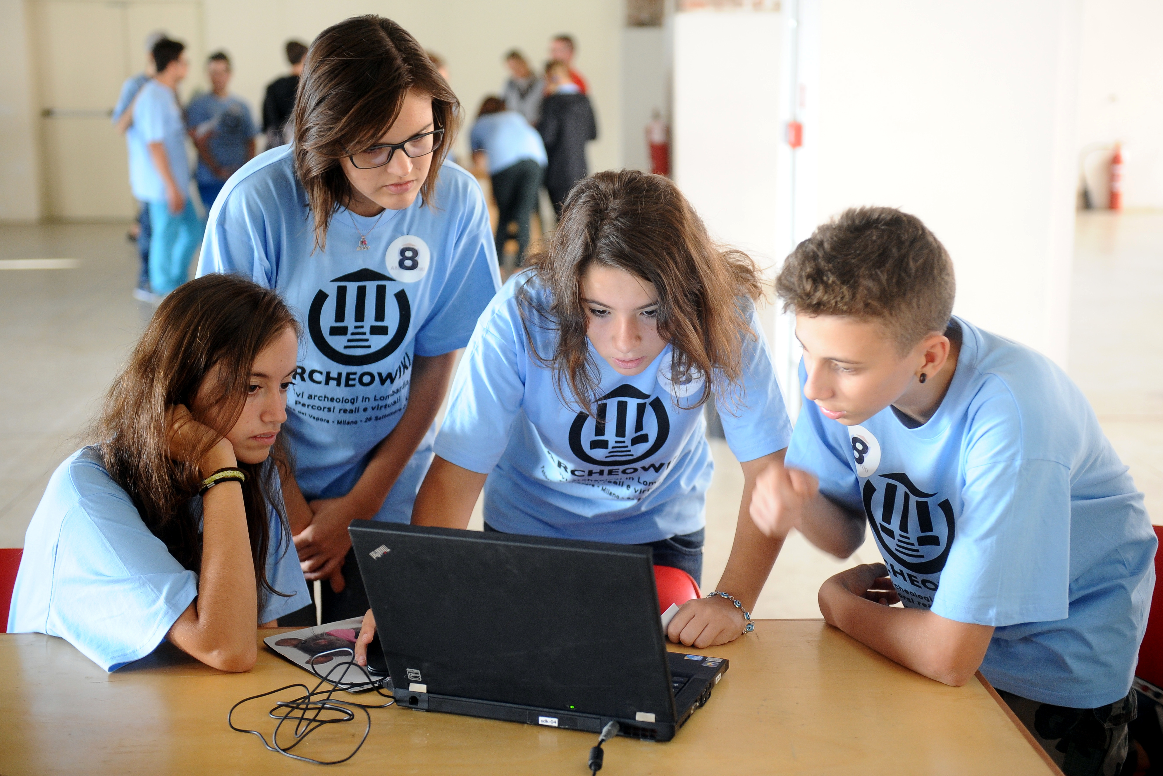 Evento finale del progetto Archeowiki alla Fabbrica del Vapore di Milano.